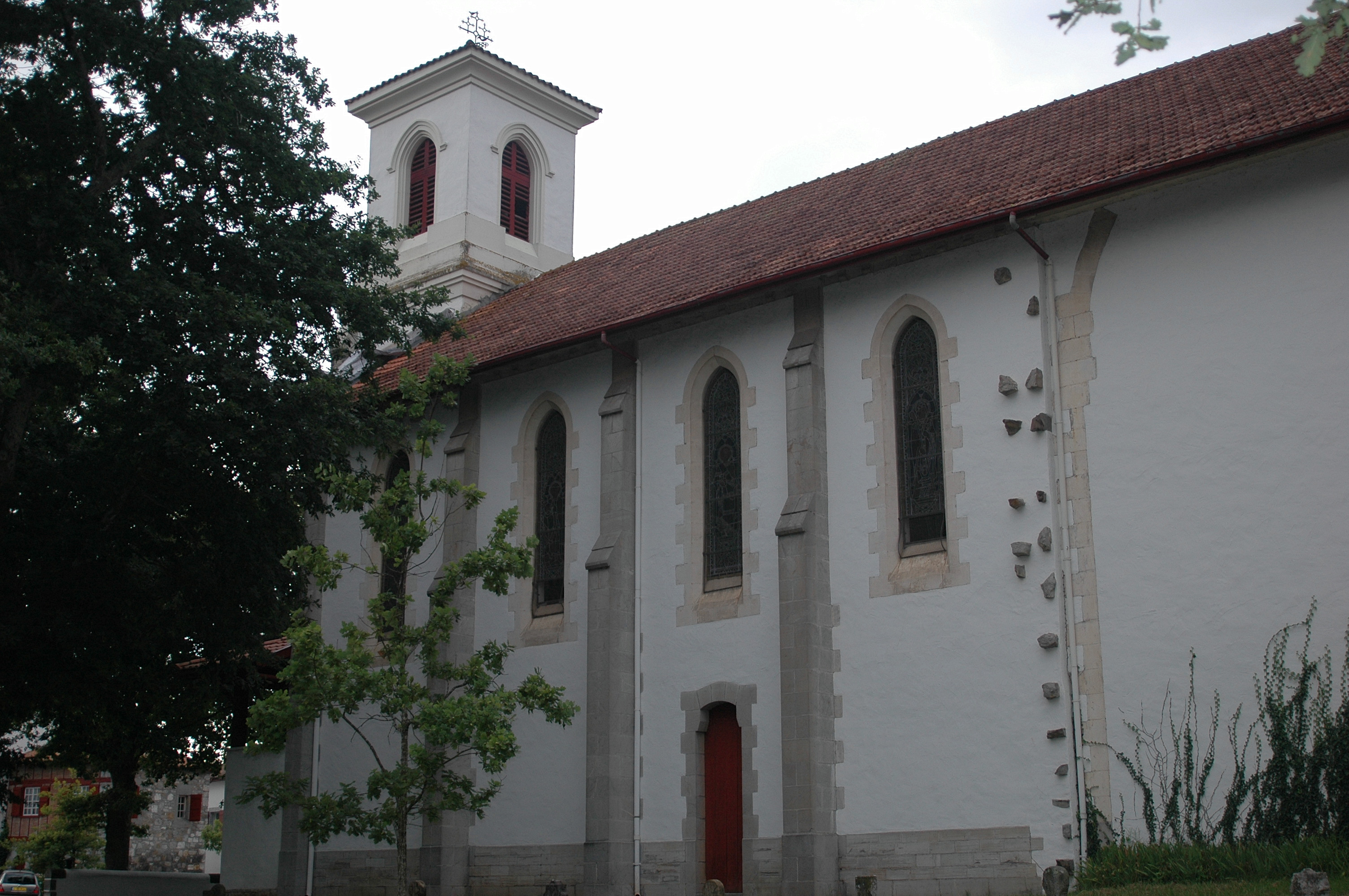 Larressore, l'église. Photo prise le 08/08/06 par Harrieta171